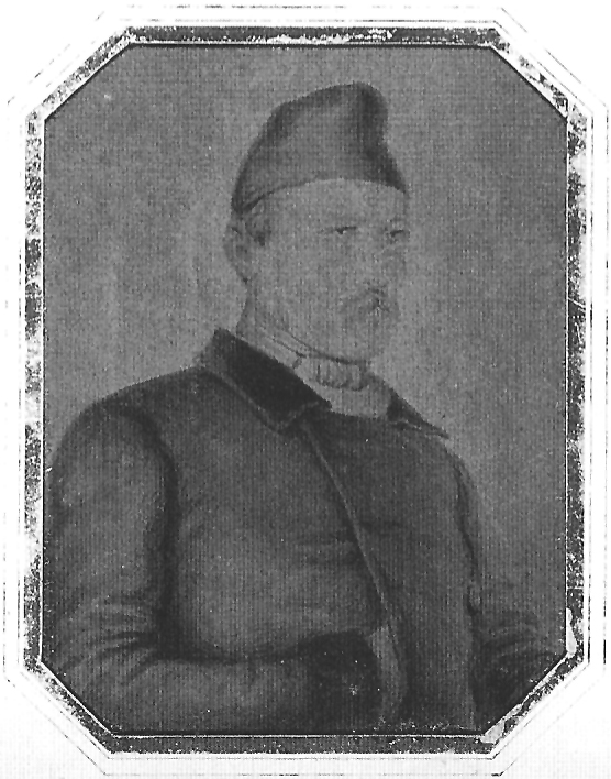 Friedrich Jakob Seitz [Schwiegersohn von Carl Dihm] (Kalotypie, Maße 106 × 79 mm; mit Rahmen 132 × 118 mm)